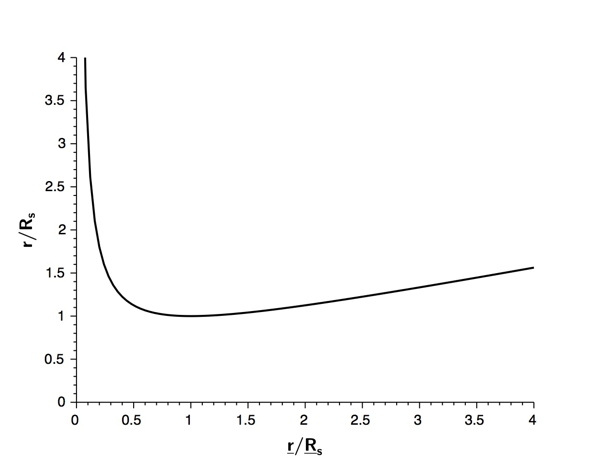 variable radiale classique de Schwarzschild en fonction de la variable radiale isotrope